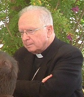 Messeigneurs Bernard Panafieu et Nicolas Brouwet lors d'une conférence de presse.